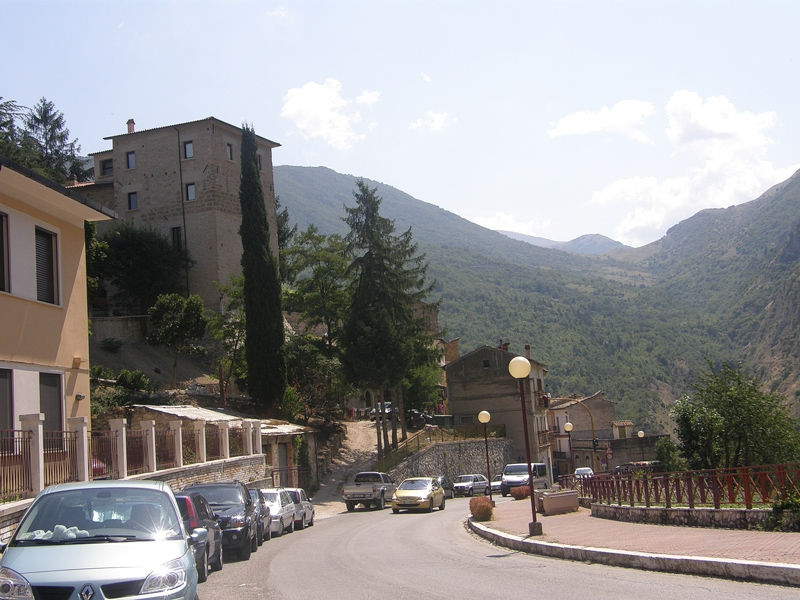 Anversa degli Abruzzi 2009